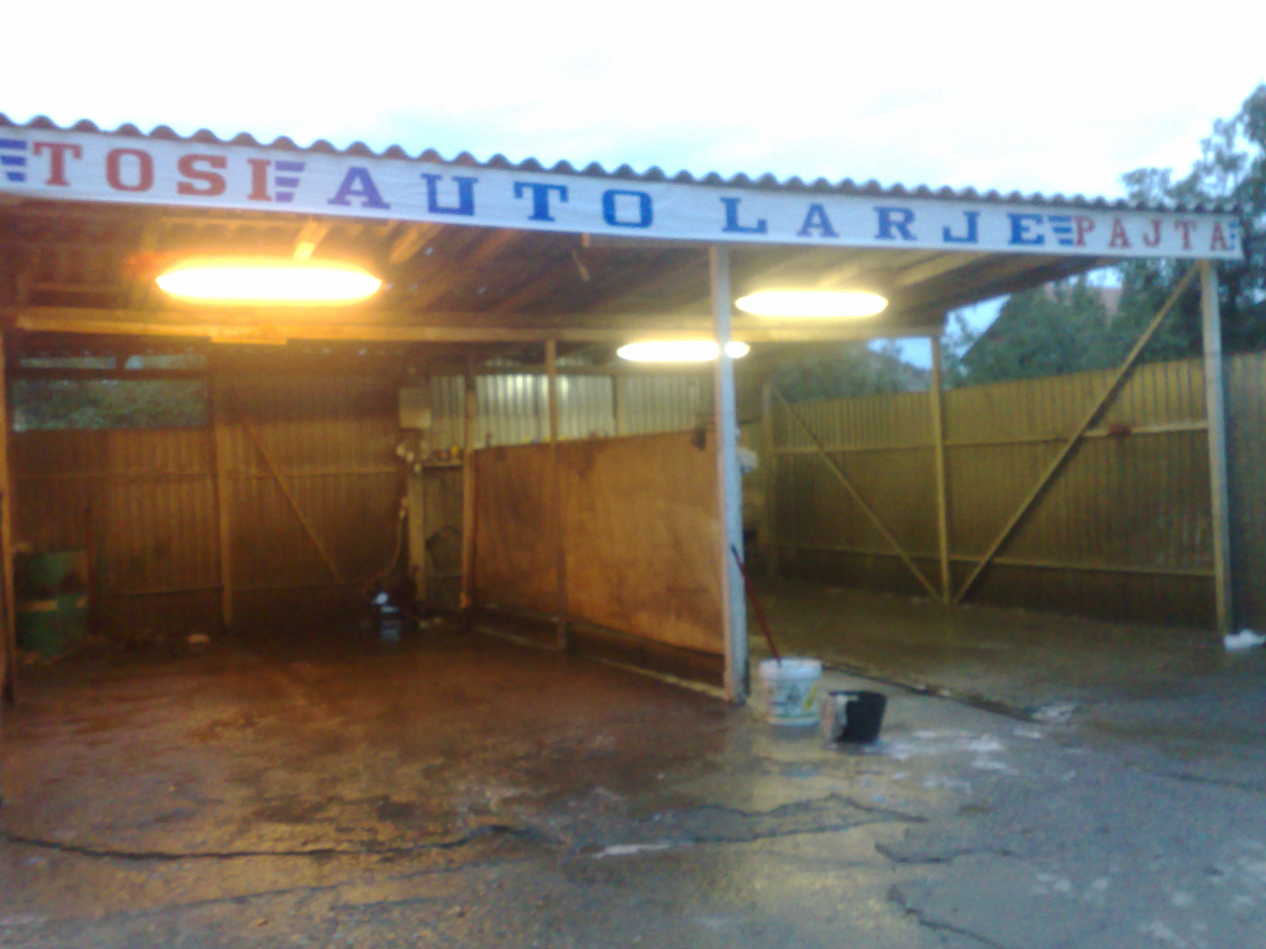 auto larje ne rrugen fehmi lladrofci